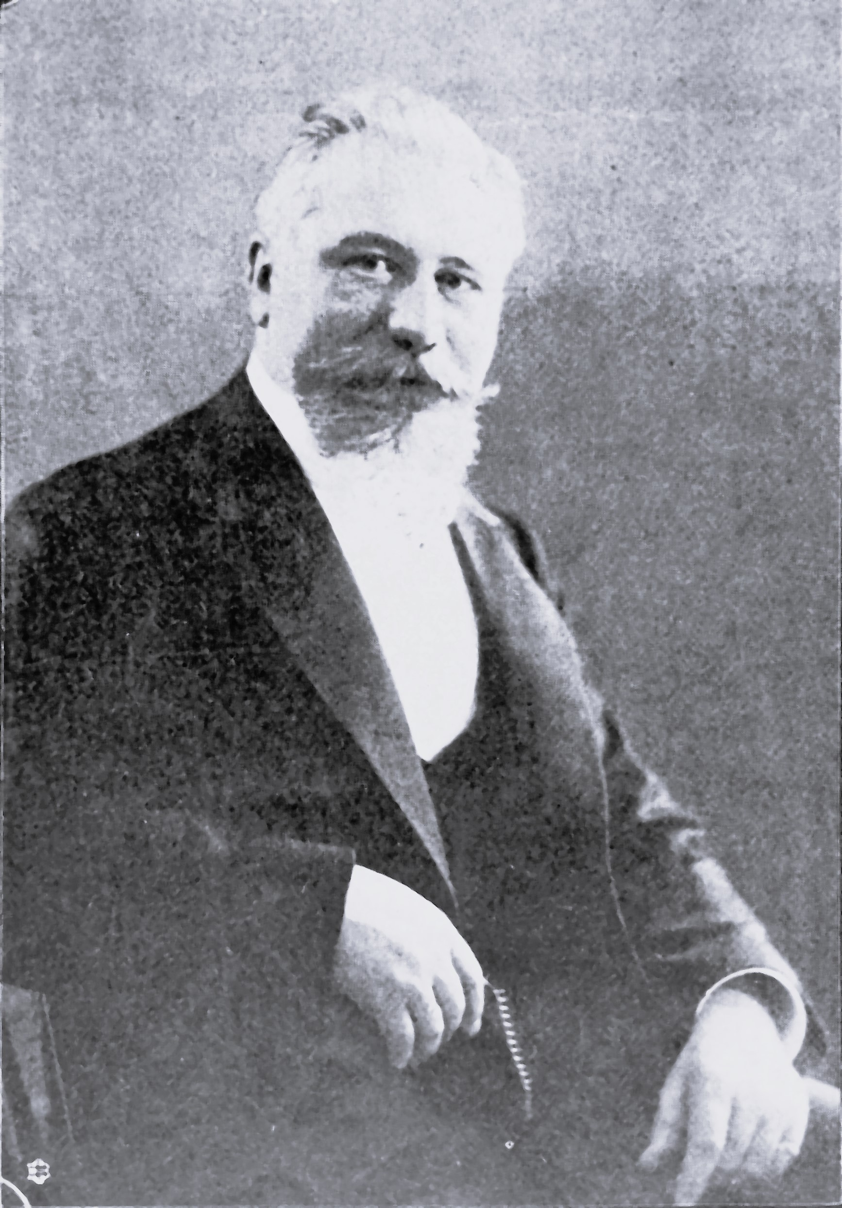 Schulrat Professor Dr. Jakob Wychgram.